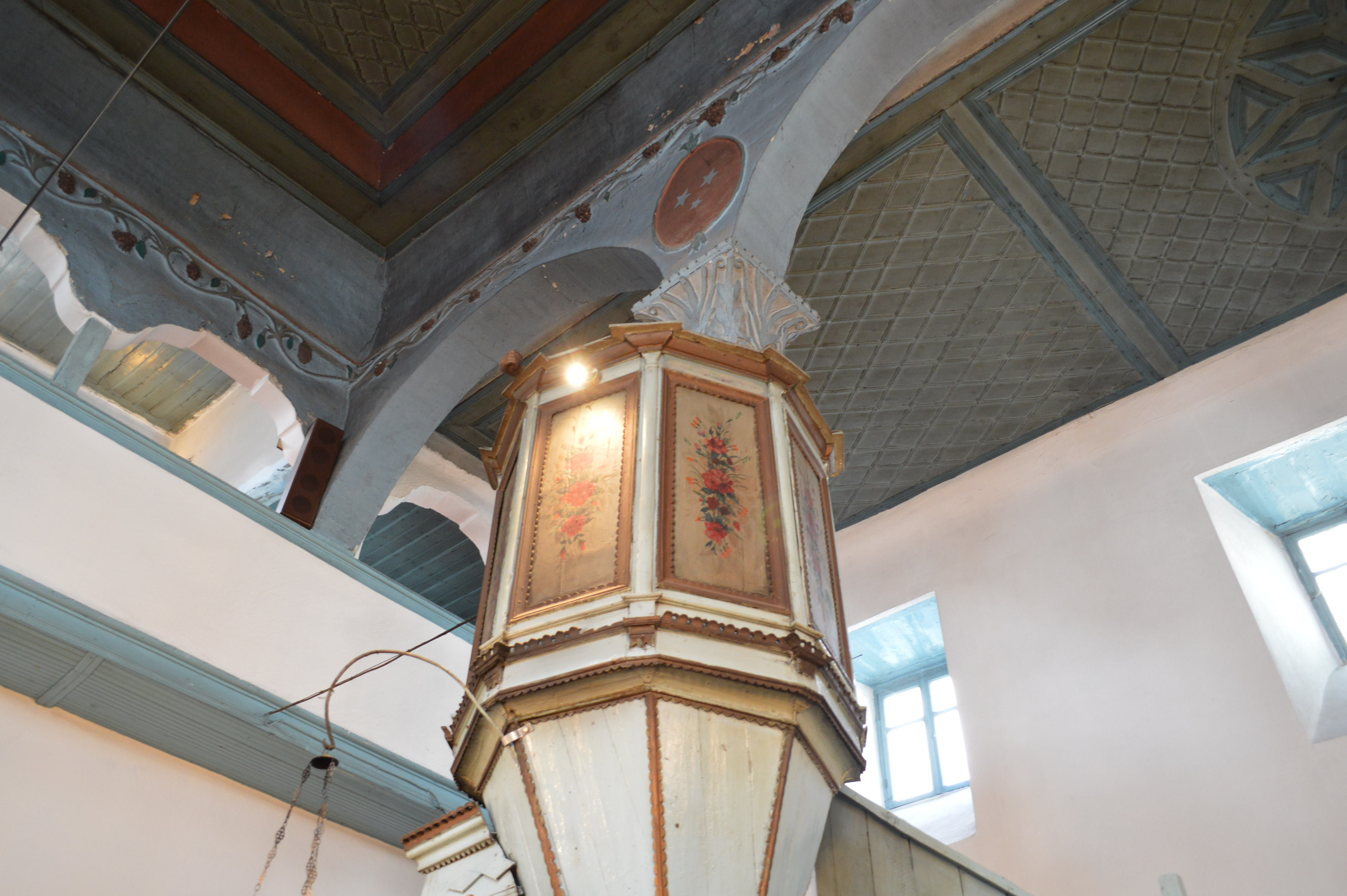 Εσωτερικό του Ναού (8)